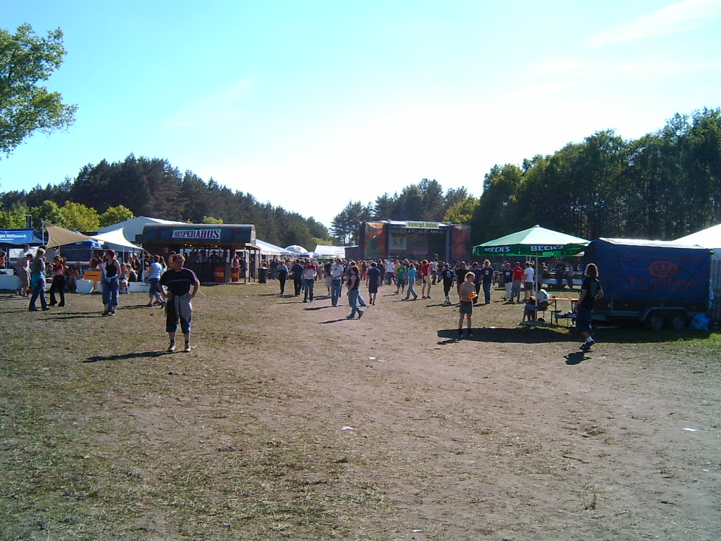 Immergut festival 2004 Foto des Festivalgeländes